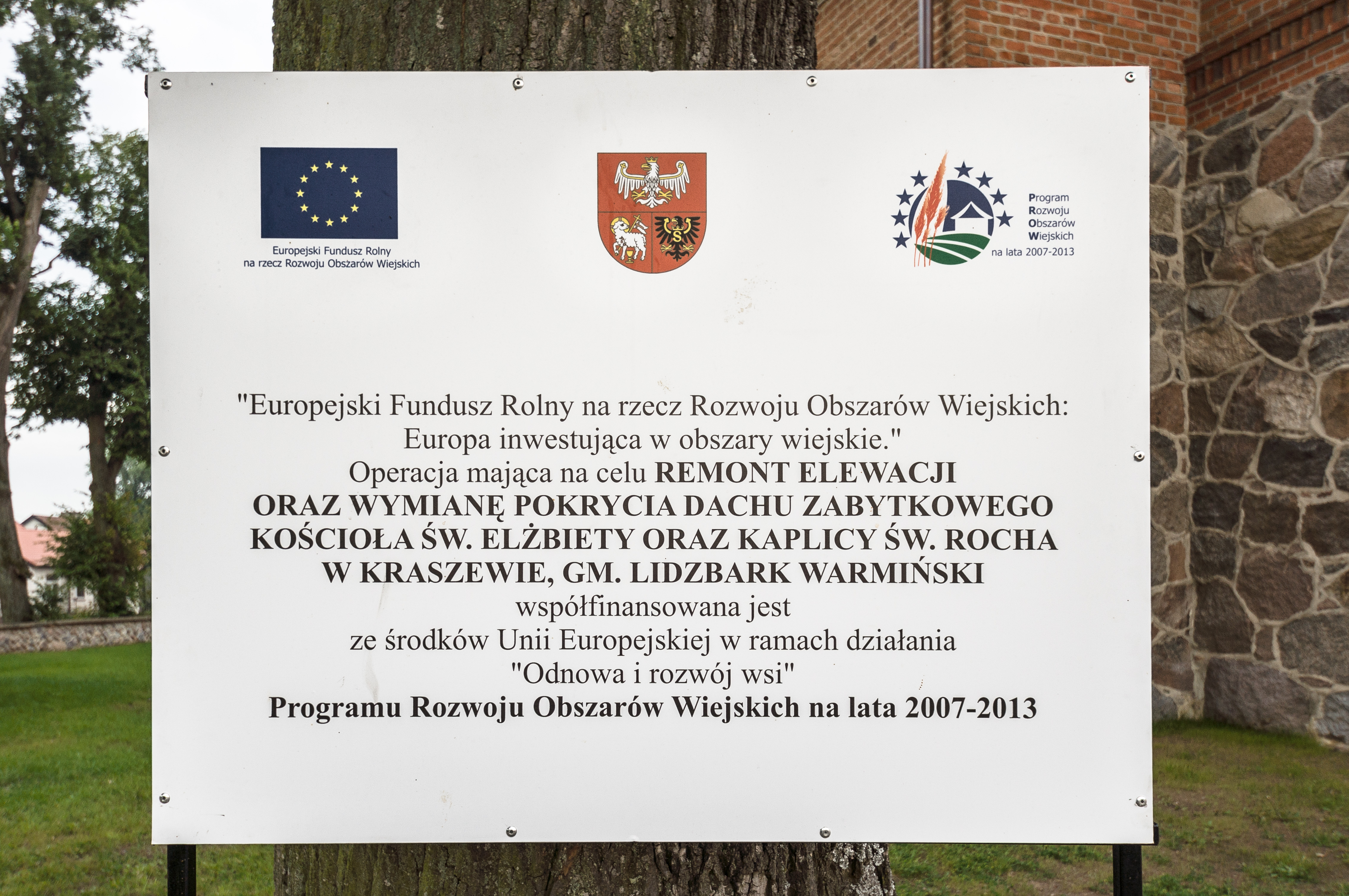 Kościół p.w. św. Elżbiety w Kraszewie.Tekst na tablicy:"Europejski Fundusz Rolny na rzecz Rozwoju Obszarów Wiejskich: Europa inwestująca w obszary wiejskie." Operacja mająca na celu REMONT ELEWACJI ORAZ WYMIANĘ POKRYCIA DACHU ZABYTKOWEGO KOŚCIOŁA ŚW. ELŻBIETY ORAZ KAPLICY ŚW. ROCHA W KRASZEWIE, GM. LIDZBARK WARMIŃSKI współfinansowana jest ze środków Unii Europejskiej w ramach działania "Odnowa i rozwój wsi" Programu Rozwoju Obszarów Wiejskich na lata 2007-2013.